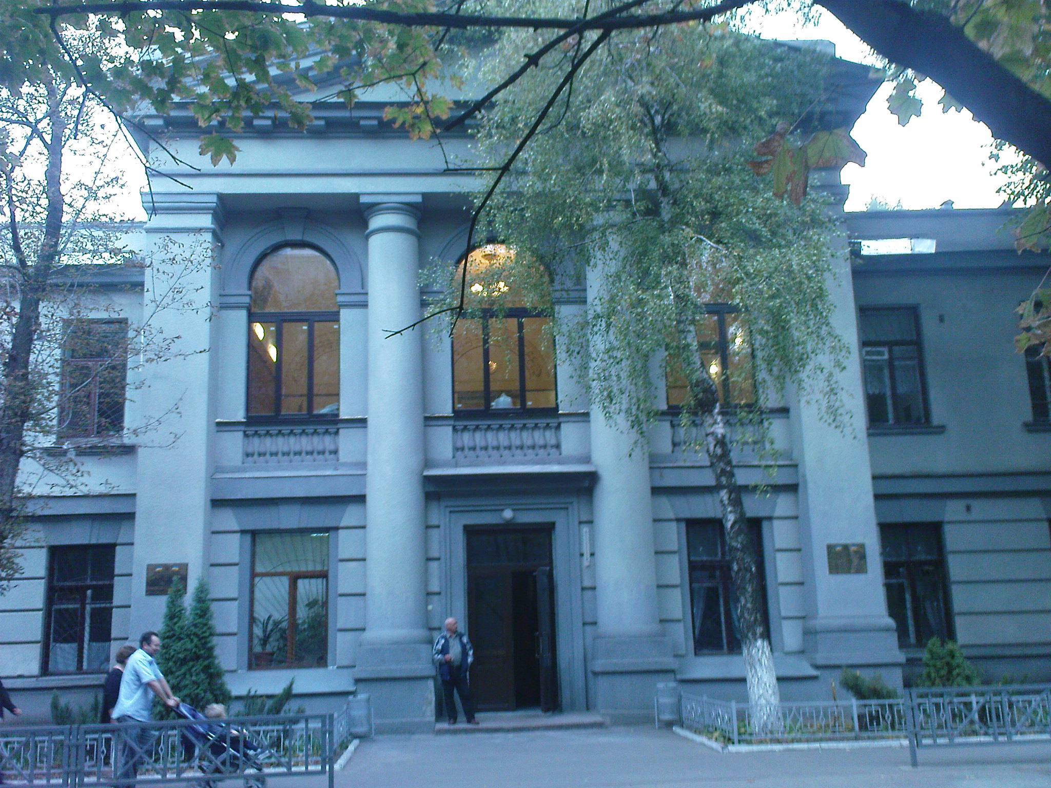 Україна, Харків, вул. Чайковська, 4